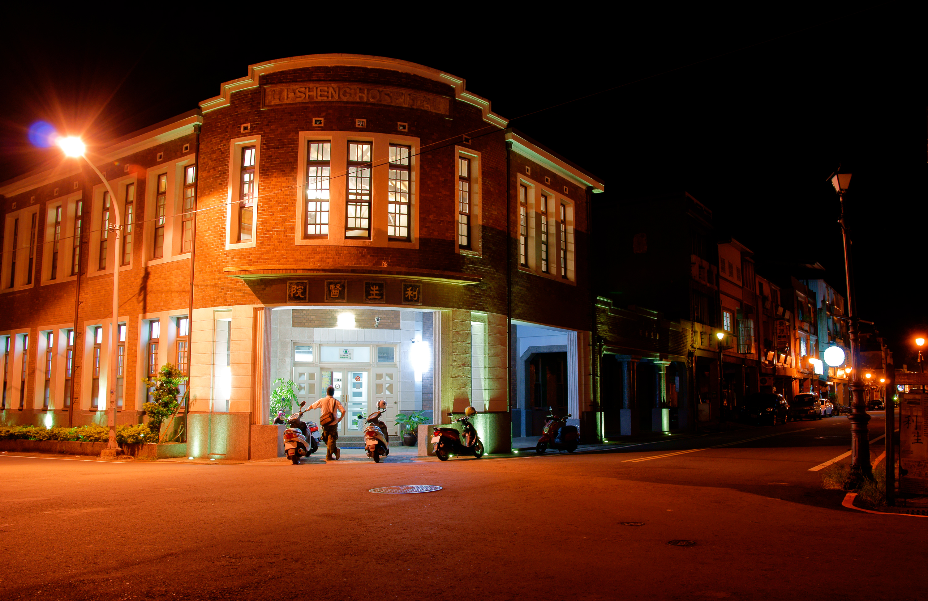 利生醫院，早在1920年建立於宜蘭五結鄉，有著將近九十年的歷史，是宜蘭利澤簡地區最早的一家醫院，位於利澤老街，經常作為電影等題材的取景地點。